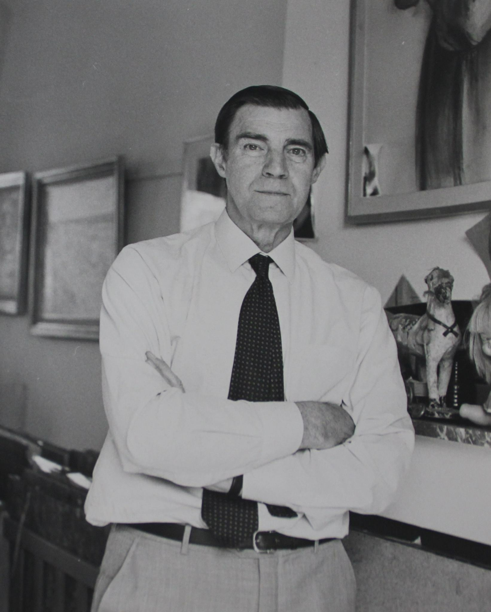 Portret van Paul Smolders